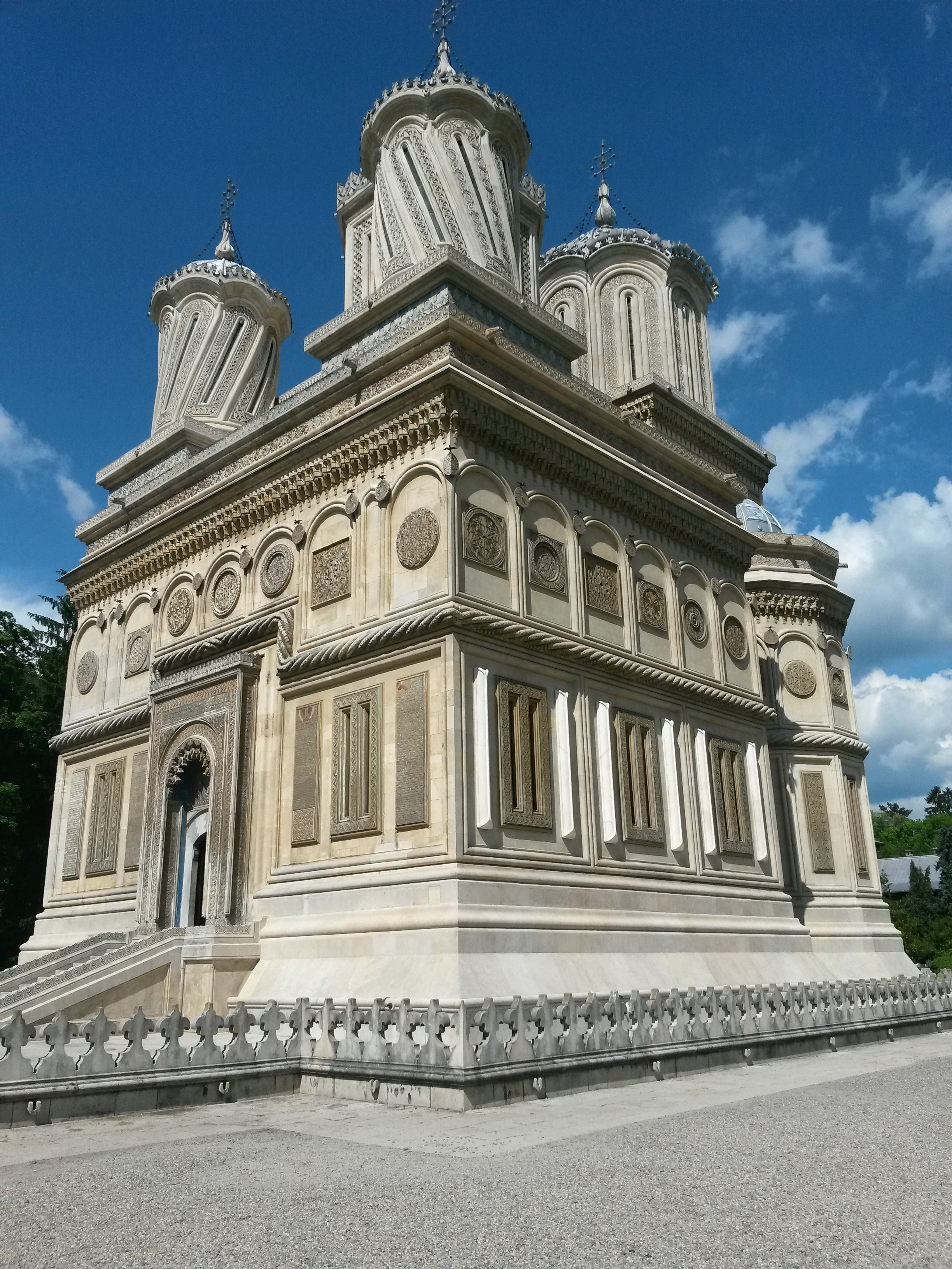 Manastirea Curtea de Arges, Judet Arges 01